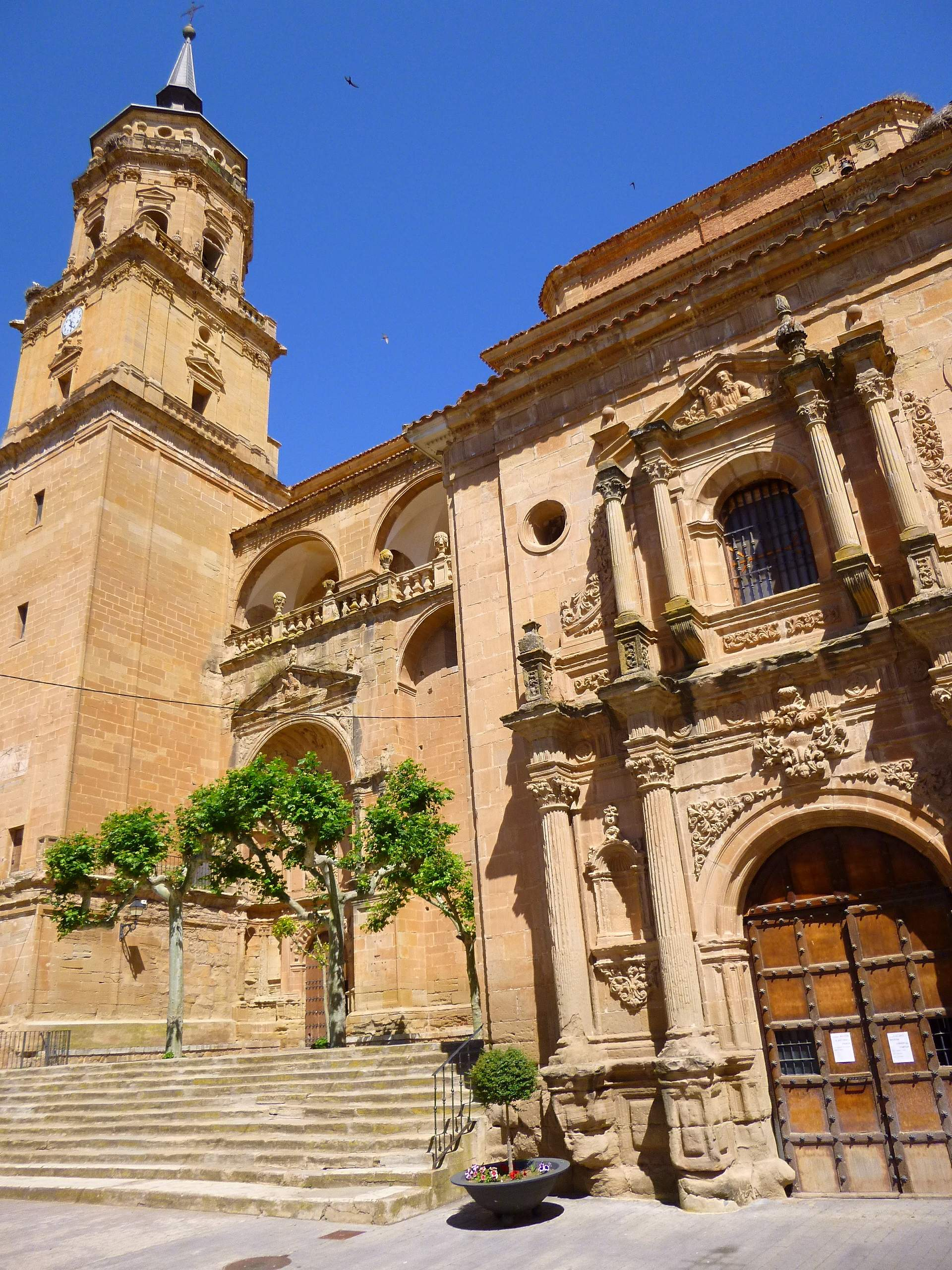 Iglesia de San Esteban (Murillo de Río Leza, La Rioja)